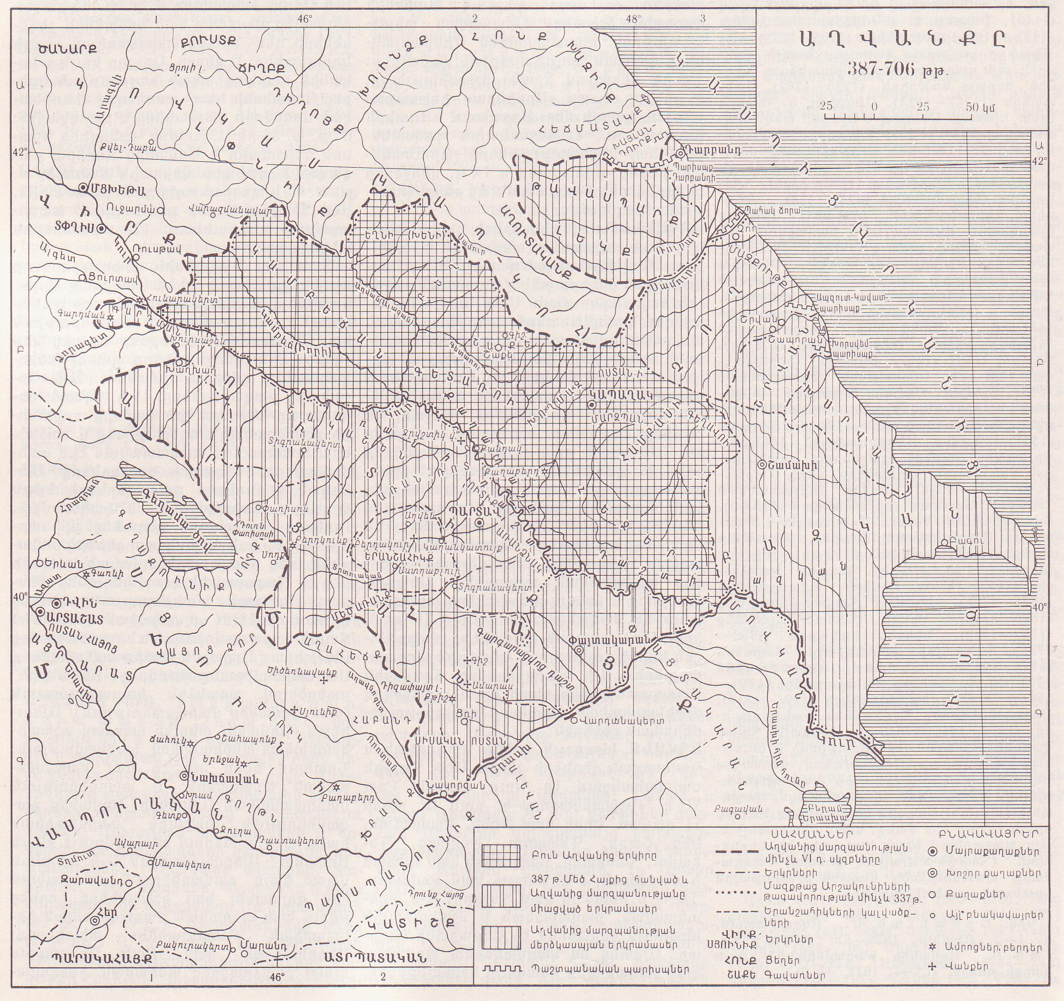 Աղվանից Մարզպանությունը 387-706